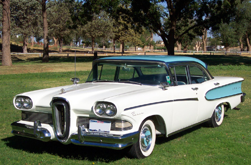 1958 Edsel Pacer 4dr sedan, taken Sept 2003.